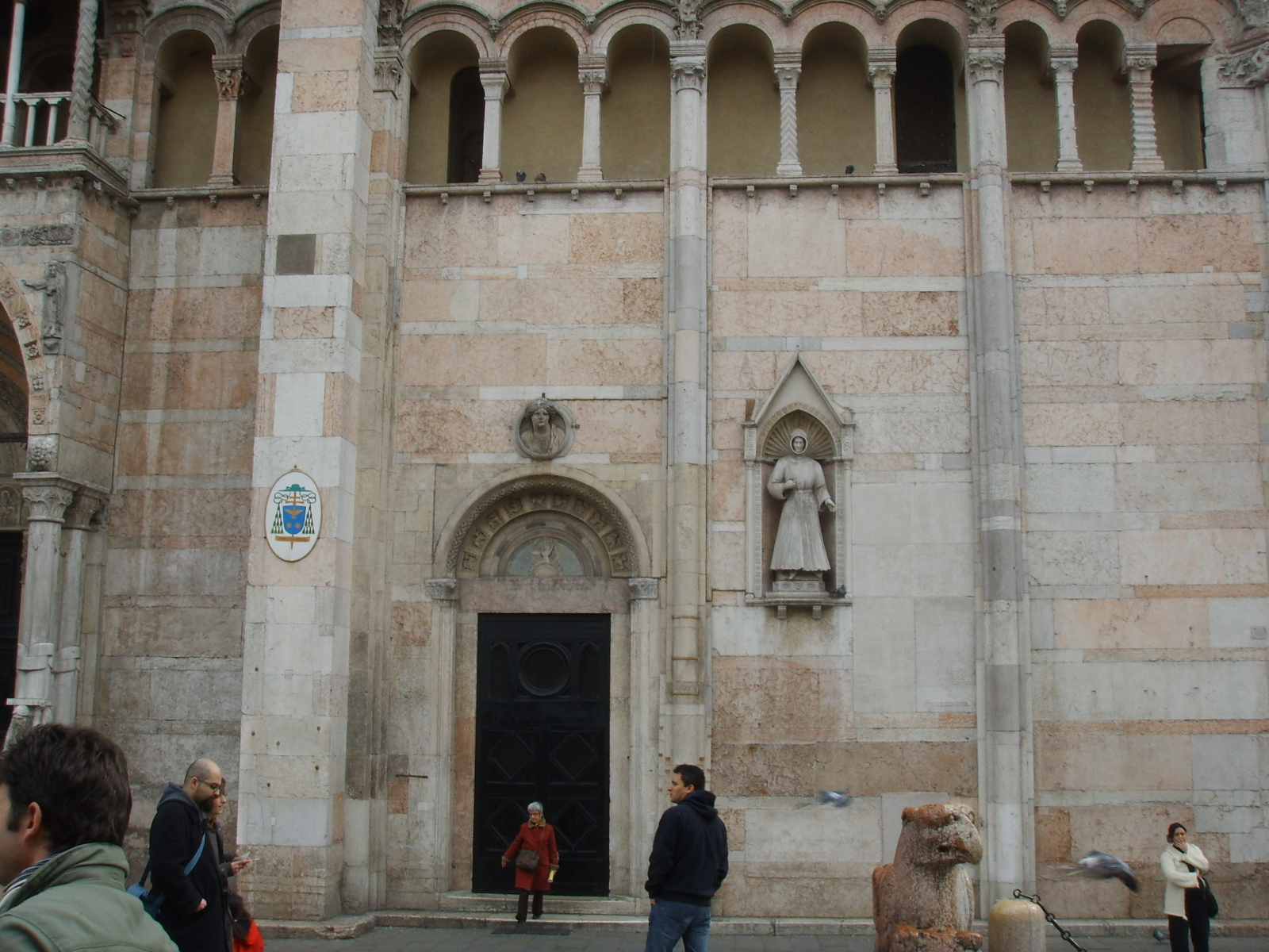 Portale di destra della facciata del Duomo di Ferrara, con statua di Alberto V d'Este in abito da pellegrino.